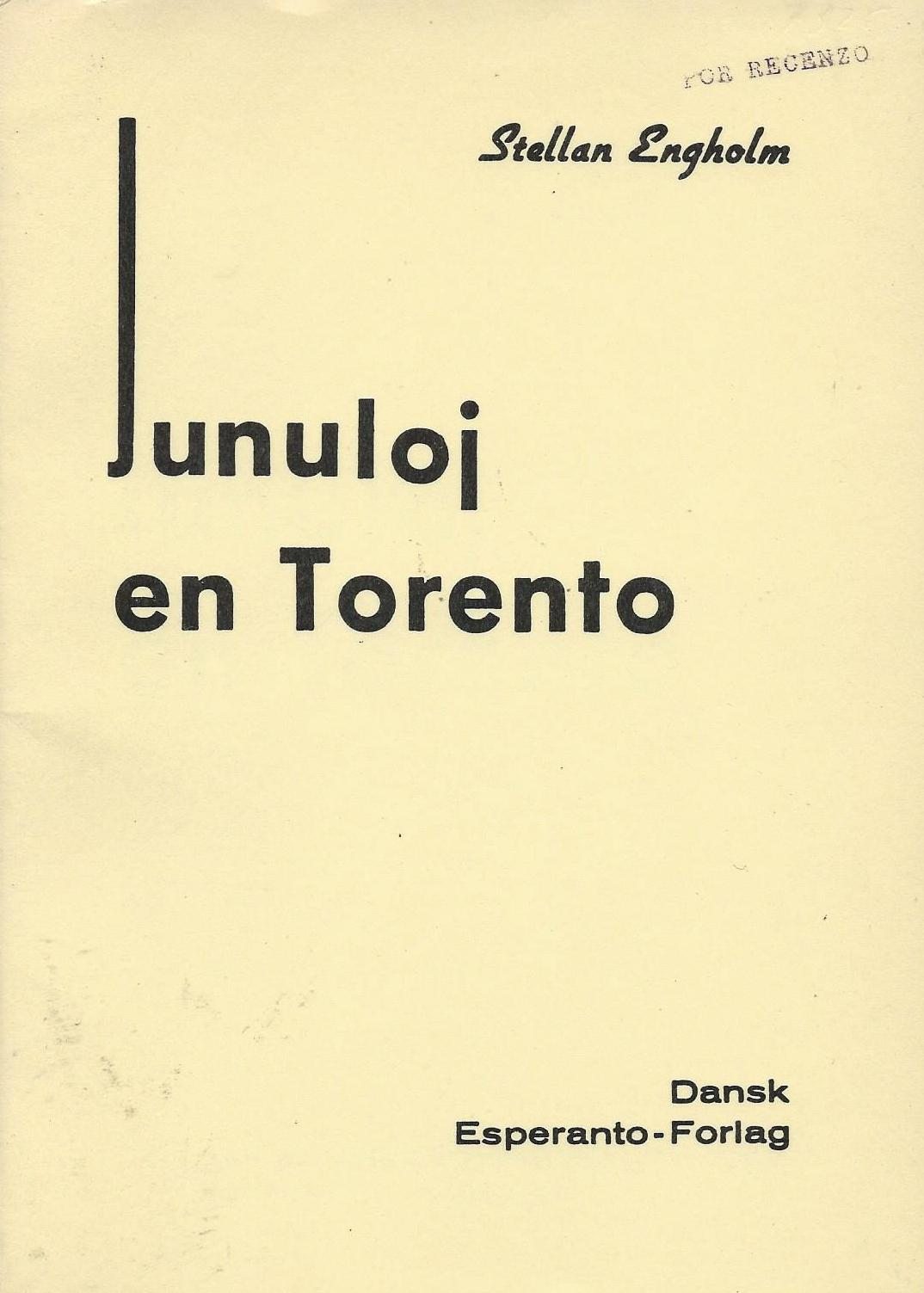 Librokovrilo de "Junuloj en Torento",1972